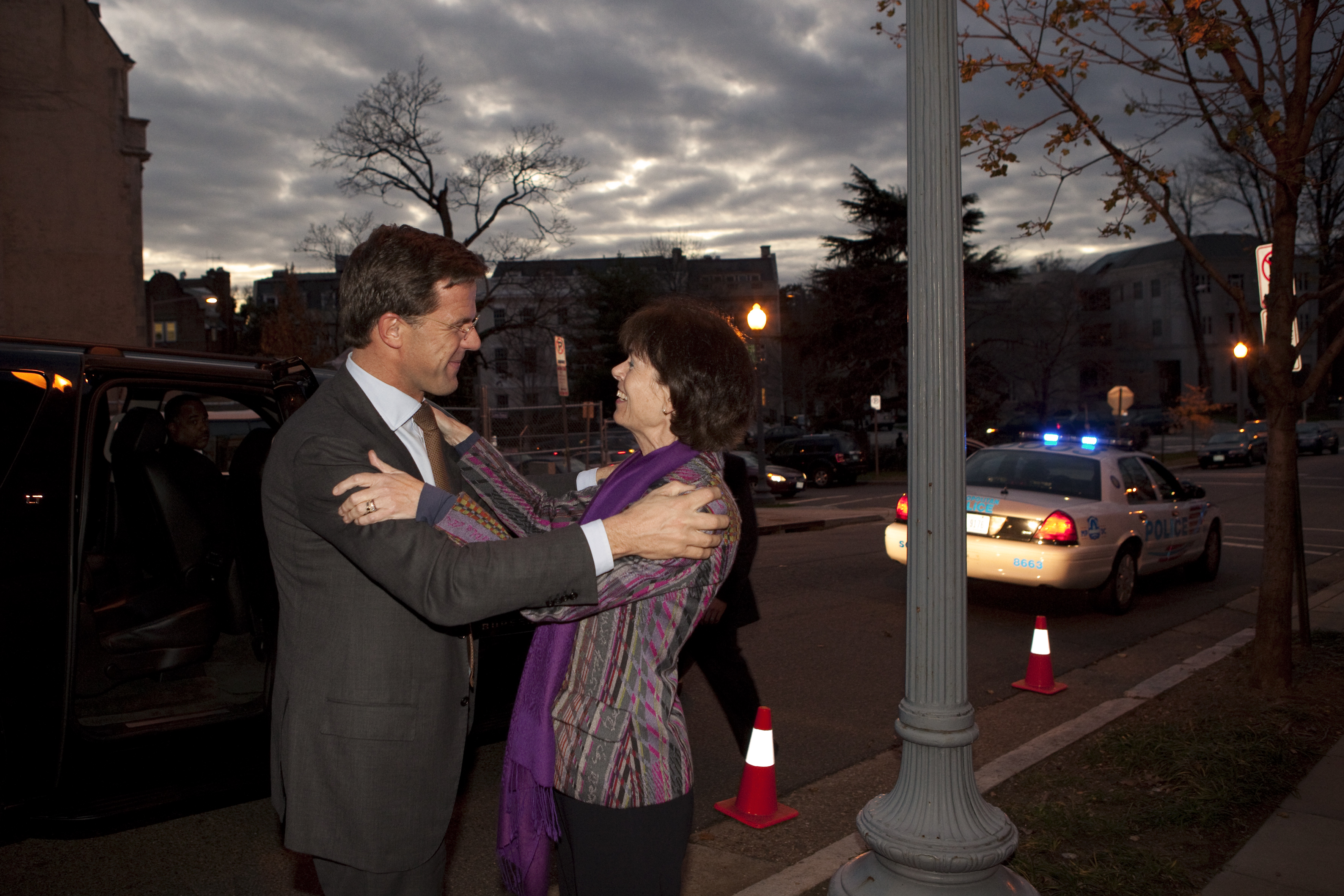 Minister-president Rutte wordt door ambassadeur Renée Jones-Bos welkom geheten in Washington DC. Morgen staat een bezoek aan president Obama op de agenda. Daarbij is ook minister Rosenthal aanwezig. In het gesprek wordt stilgestaan bij de economische banden tussen beide landen, de aanpak van de schuldencrisis, de actuele situatie in de Arabische wereld en de Navo-top die volgend jaar in Chicago plaatsvindt. De samenwerking tussen Nederland en de Verenigde Staten strekt zich uit over veel terreinen. Zeker ook economisch zijn de relaties sterk. 625.000 Amerikanen hebben een baan die gerelateerd is aan de economische band met Nederland. Nederland is de derde grootste investeerder in de Verenigde Staten. Andersom is Nederland de grootste ontvanger van directe buitenlandse investeringen die de Verenigde Staten doen. Dat levert ons 225.000 banen op. Lees meer